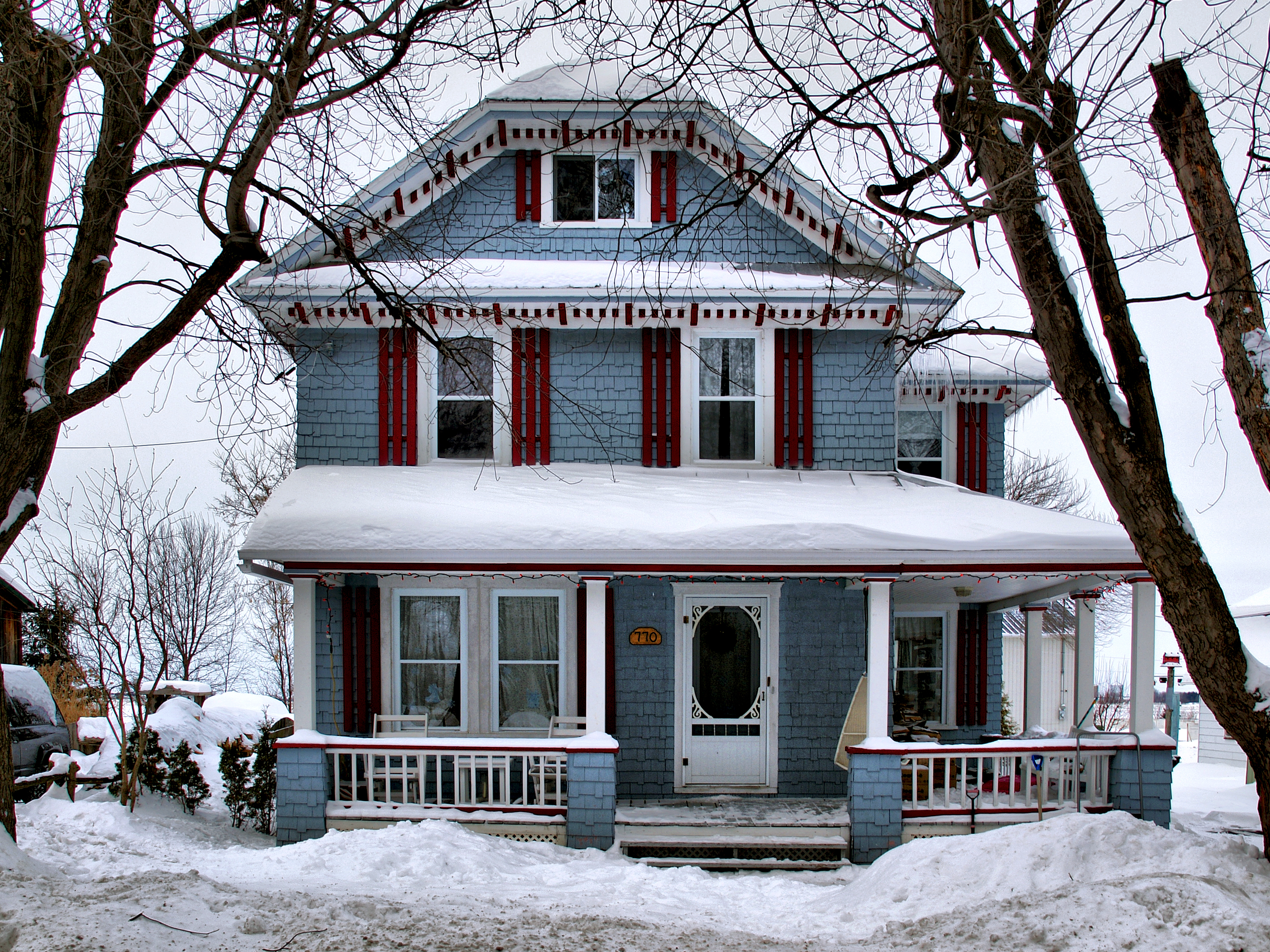 Saint-Valentin - Une des vieilles maisons du village